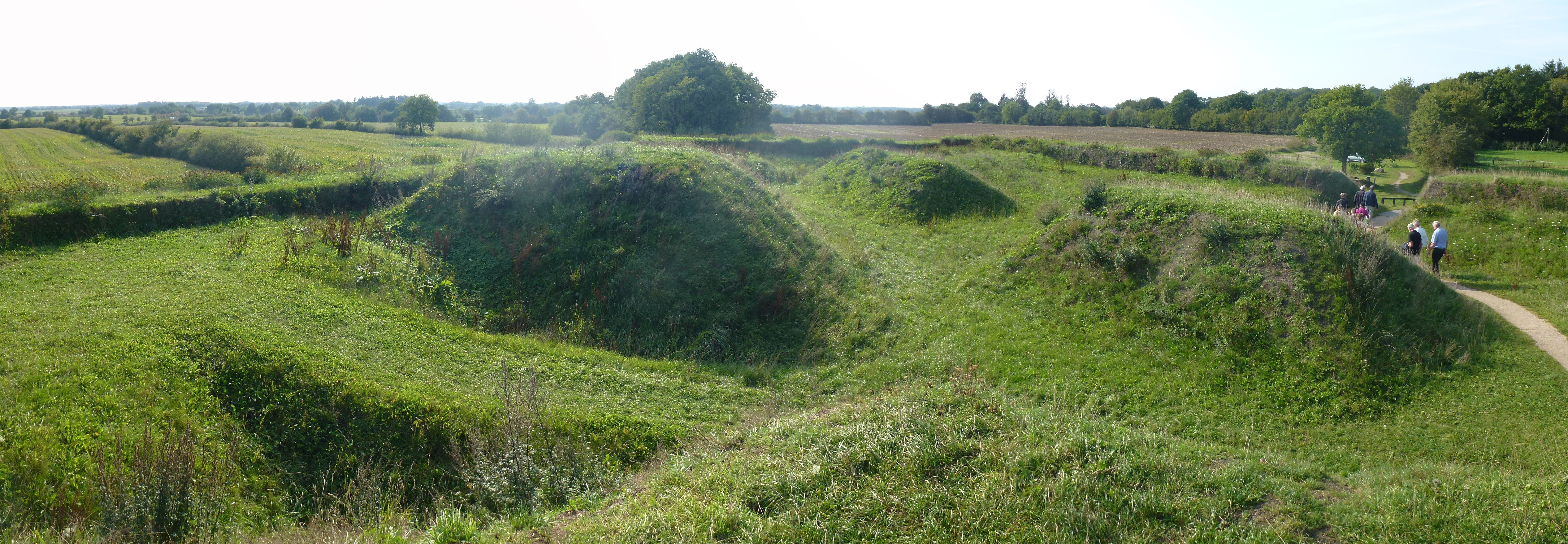 Schanze 14, Danevirke